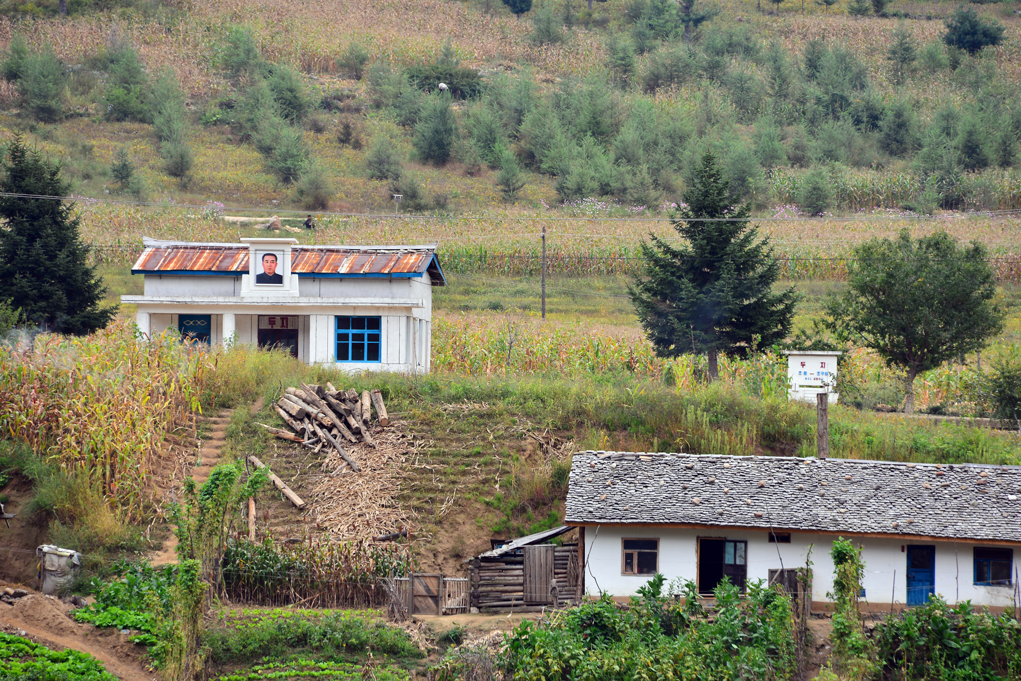 两江道杜芝站